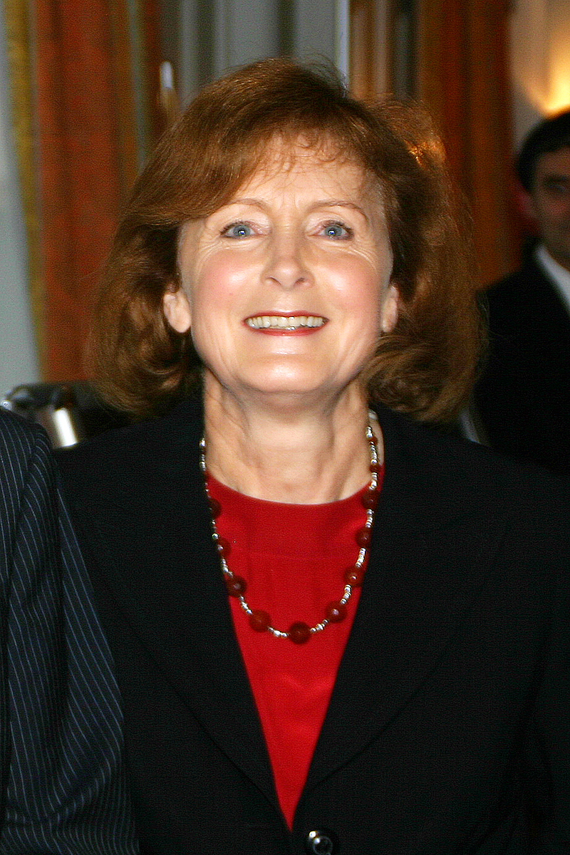 Hildegard Kronawitter, hier beim Geburtstags-Empfang der Münchner SPD für Ihren Ehemann Georg Kronawitter (SPD) am 21. April 2007 in München (im Pschorr-Bräu)